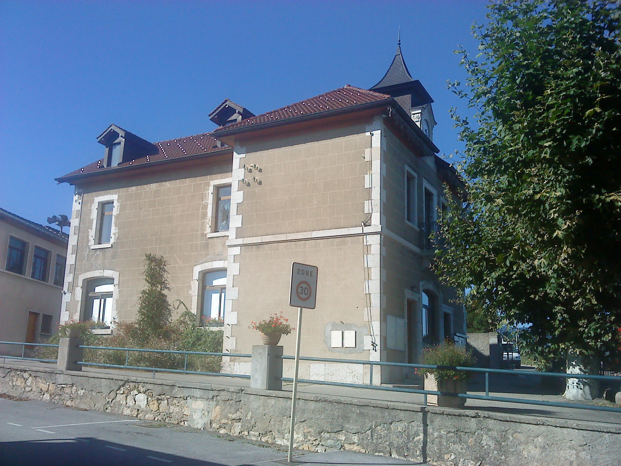 Mairie de Chevry, Ain, France